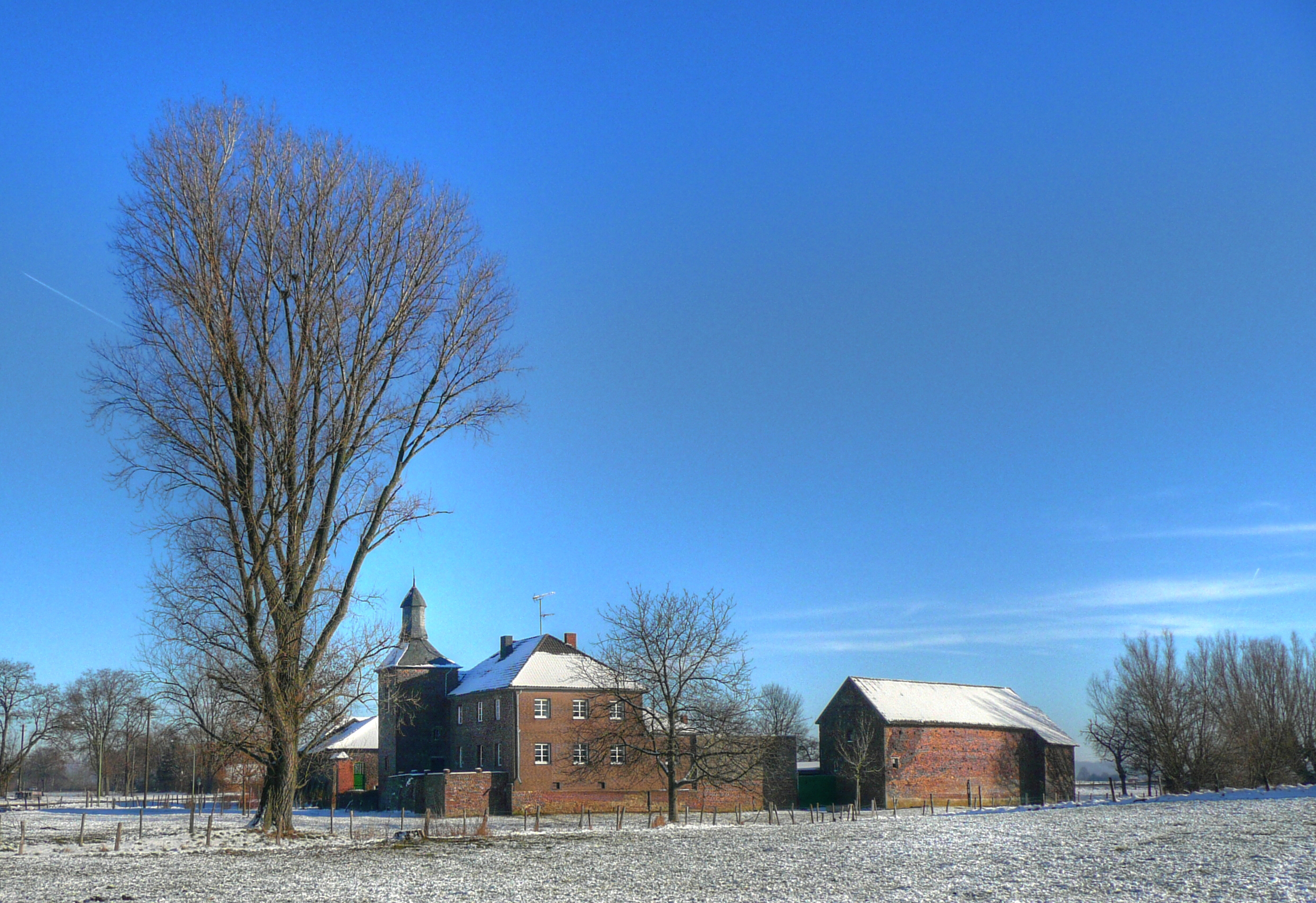 Haus Pesch (zu Pier zugehörig)